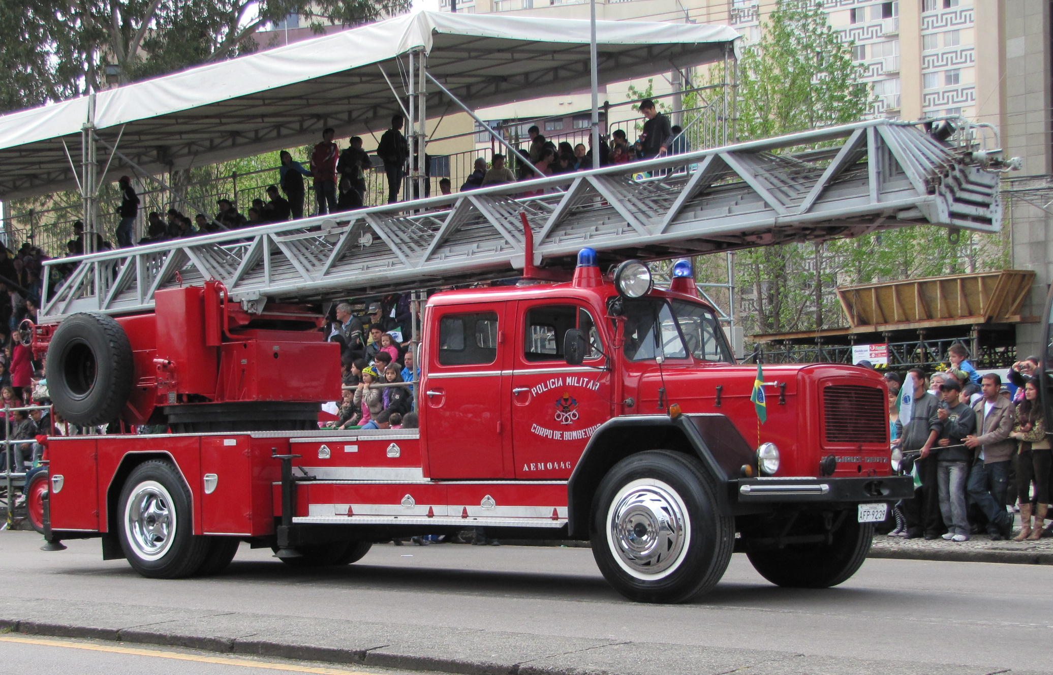 Auto Escada Mecânica do Corpo de Bombeiros do Paraná.